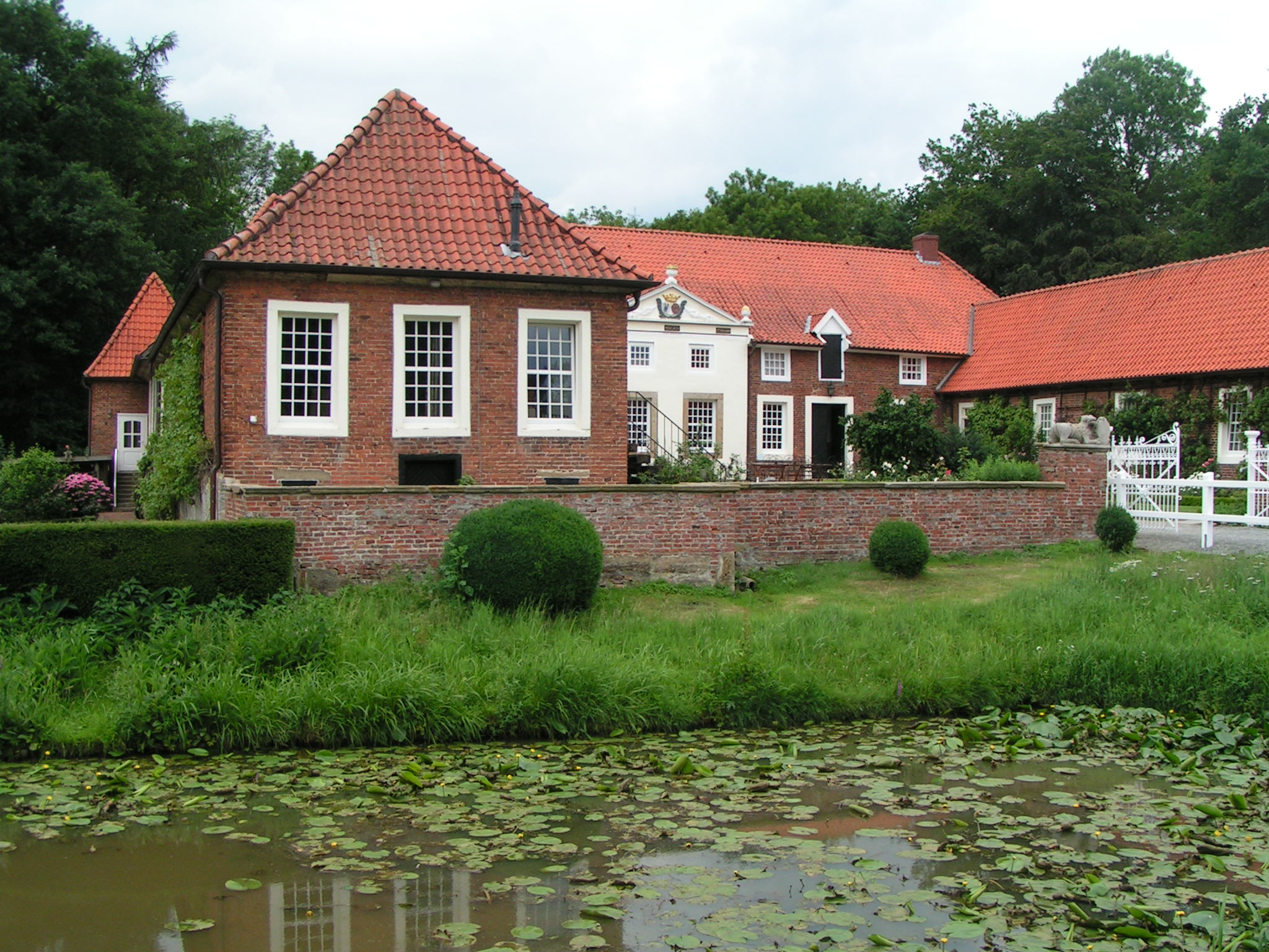 (Guts-)Haus Landegge in Haren (Ems)